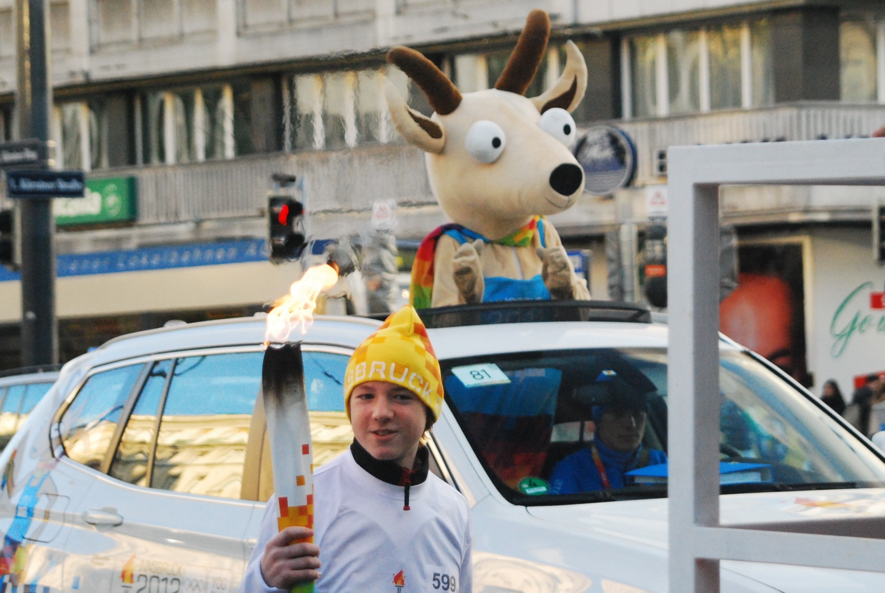 Fackelläufer und Maskottchen für die Olympischen Jugend-Winterspiele 2012 in Innsbruck auf der Wiener Ringstraße